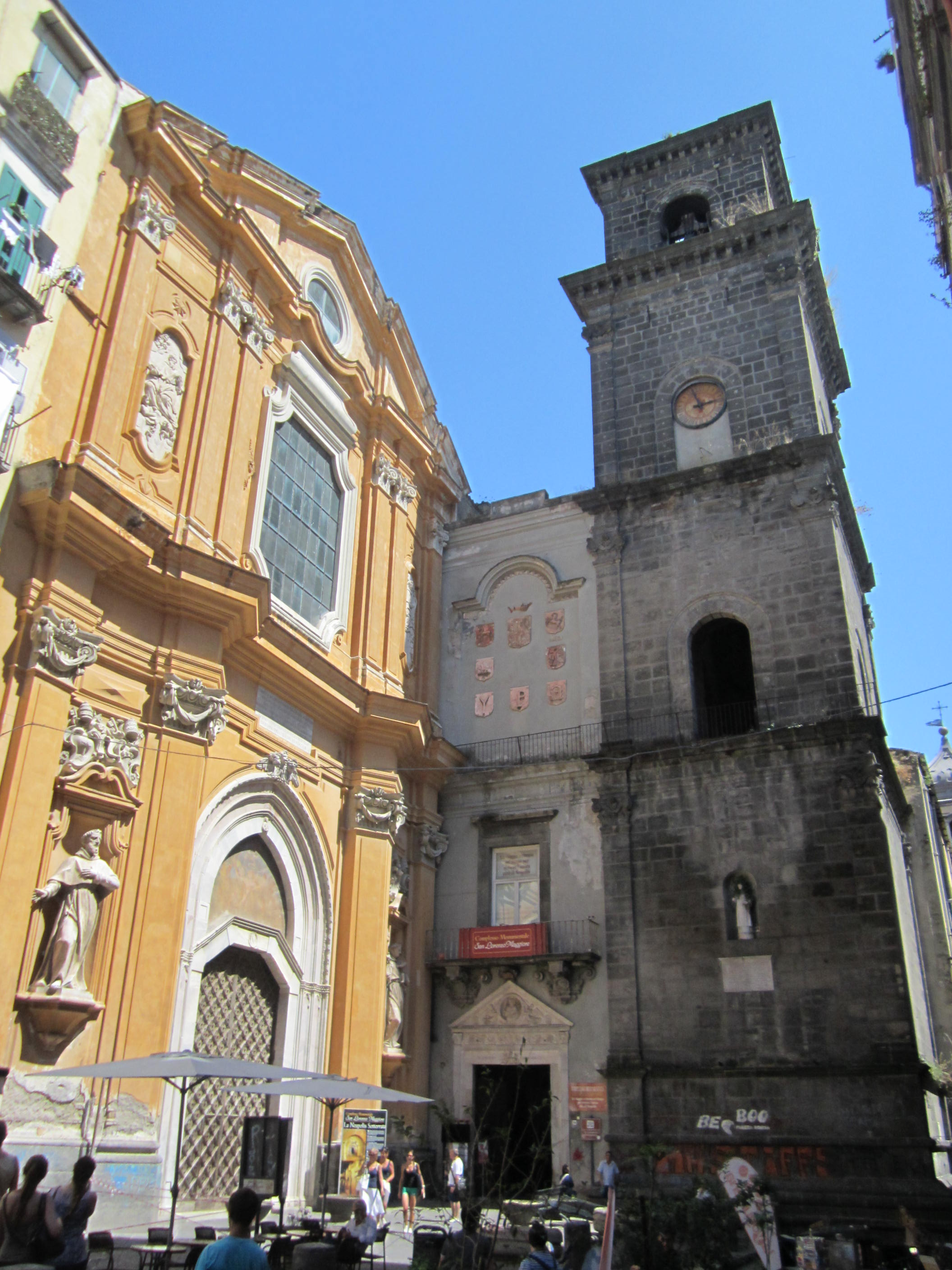 Basilica di San Lorenzo Maggiore a Napoli